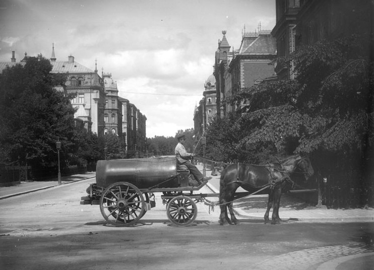 Vattentransport omkring 1896 i Stockholm